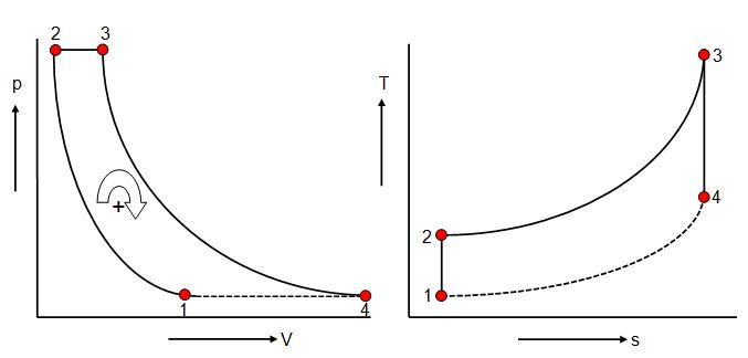 p-V en T-s diagram van het Brayton-Joule proces